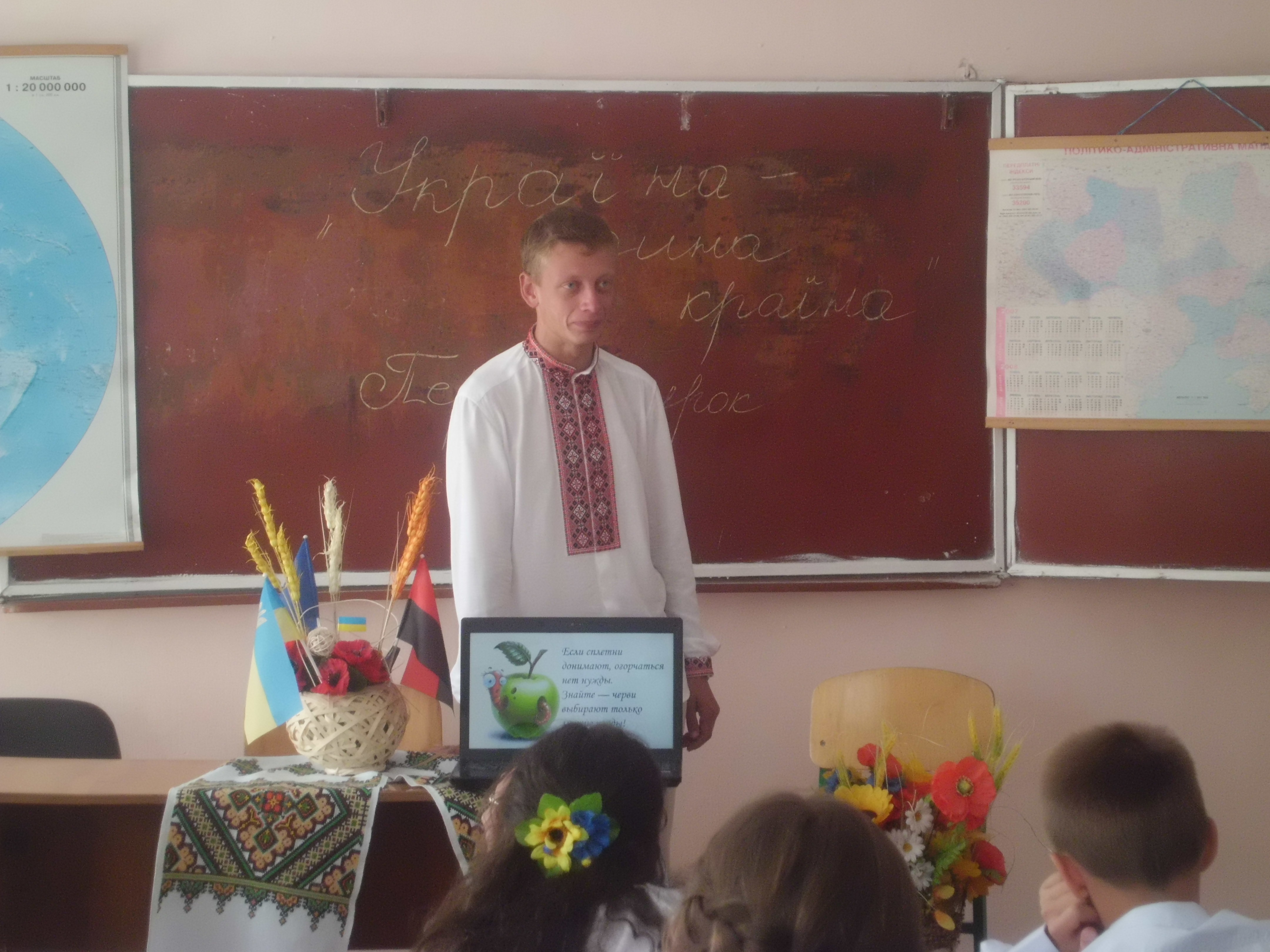 Під час відпустки між виконанням завдань в зоні проведення АТО - у Колиндянській ЗОШ І-ІІІ ступенів. Випускник школи